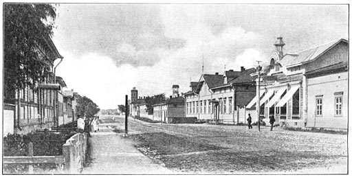 "Dorpsstraat in Sortavala"